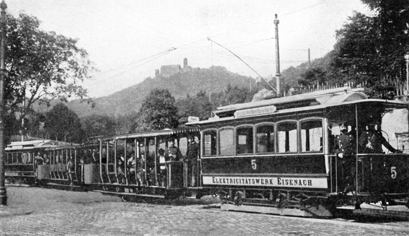 Elektrische Straßenbahn der Stadt Eisenach; Triebwagen 5 mit offenem Beiwagen.